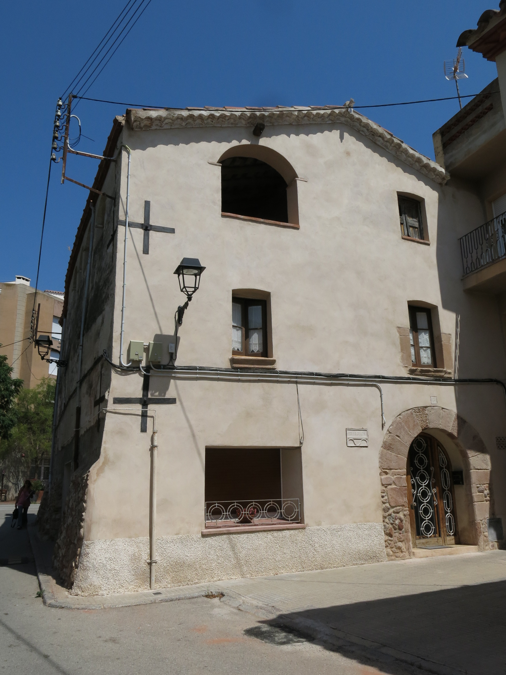 Ca la Gràcia (Sentmenat)